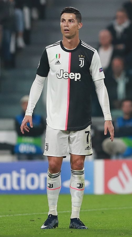 Cristiano Ronaldo em ação pela Juventus em 2019